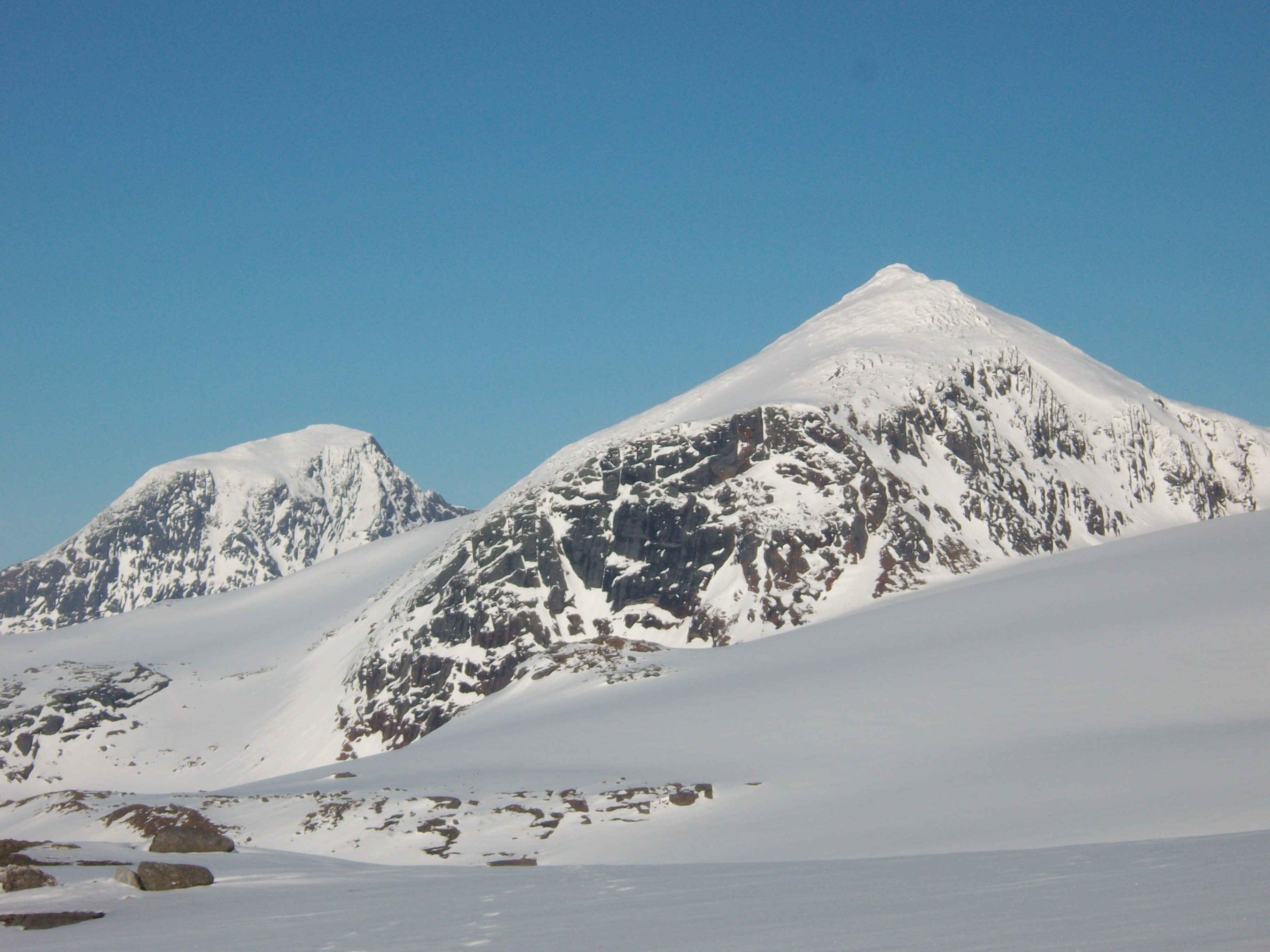 Okstinden (til høyre), sett fra brekanten. Oksskolten til venstre.